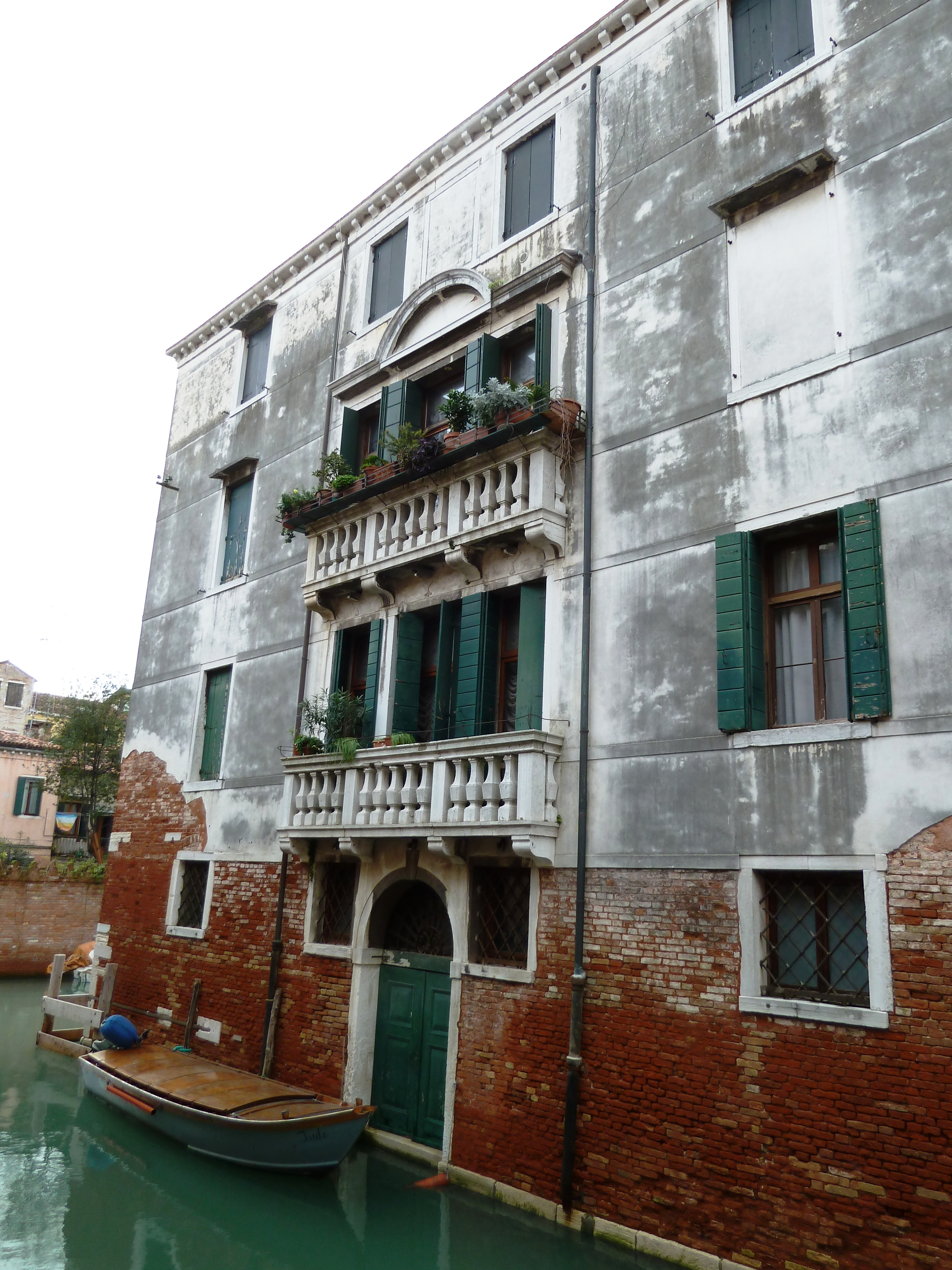 Incroce rio s andrea rio acqua dolce